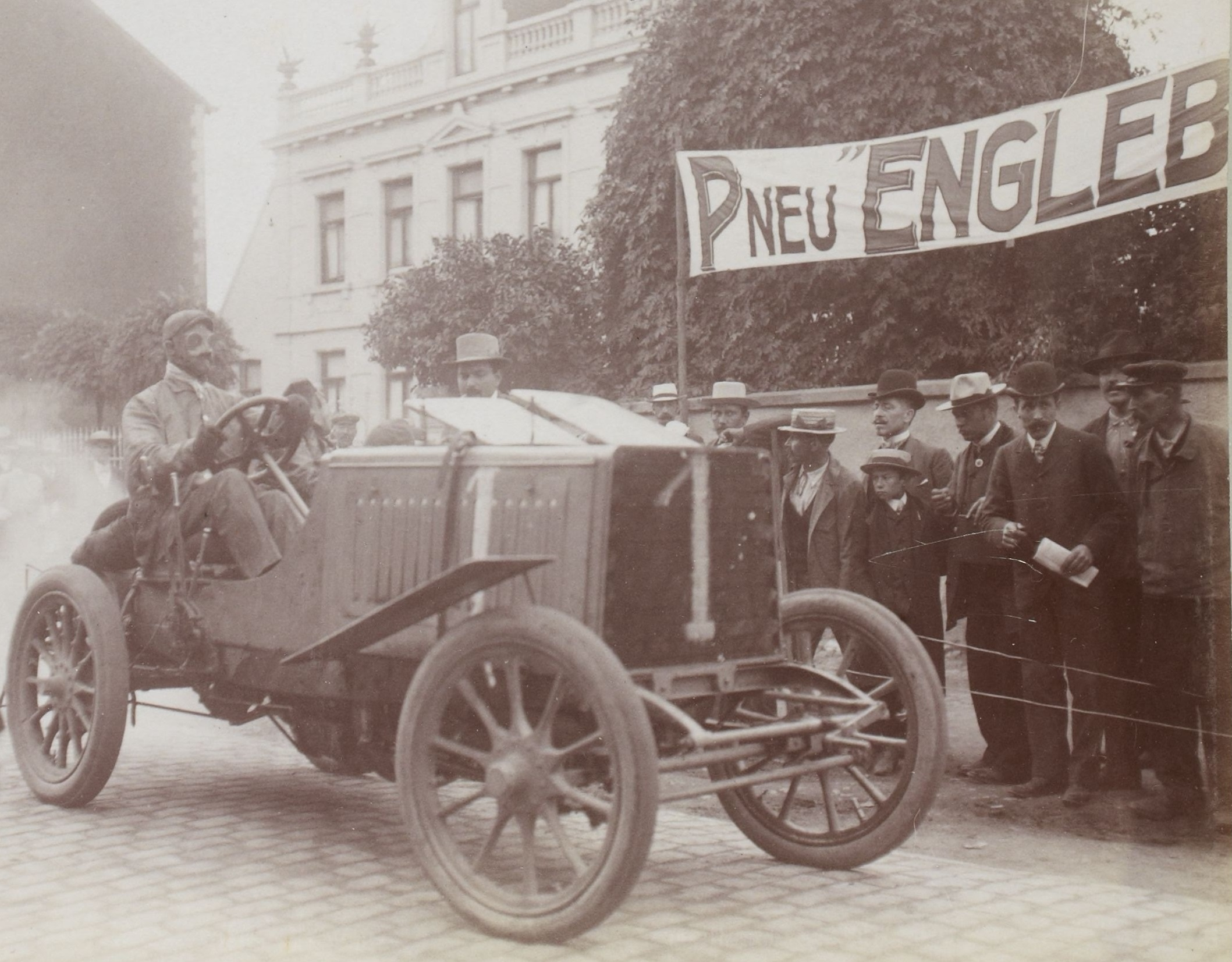 [Collection Jules Beau. Photographie sportive] : T. 27. AnnÃ©e 1904 / Jules Beau : F. 33v. [Circuit des Ardennes, Bastogne, 25 juillet 1904]